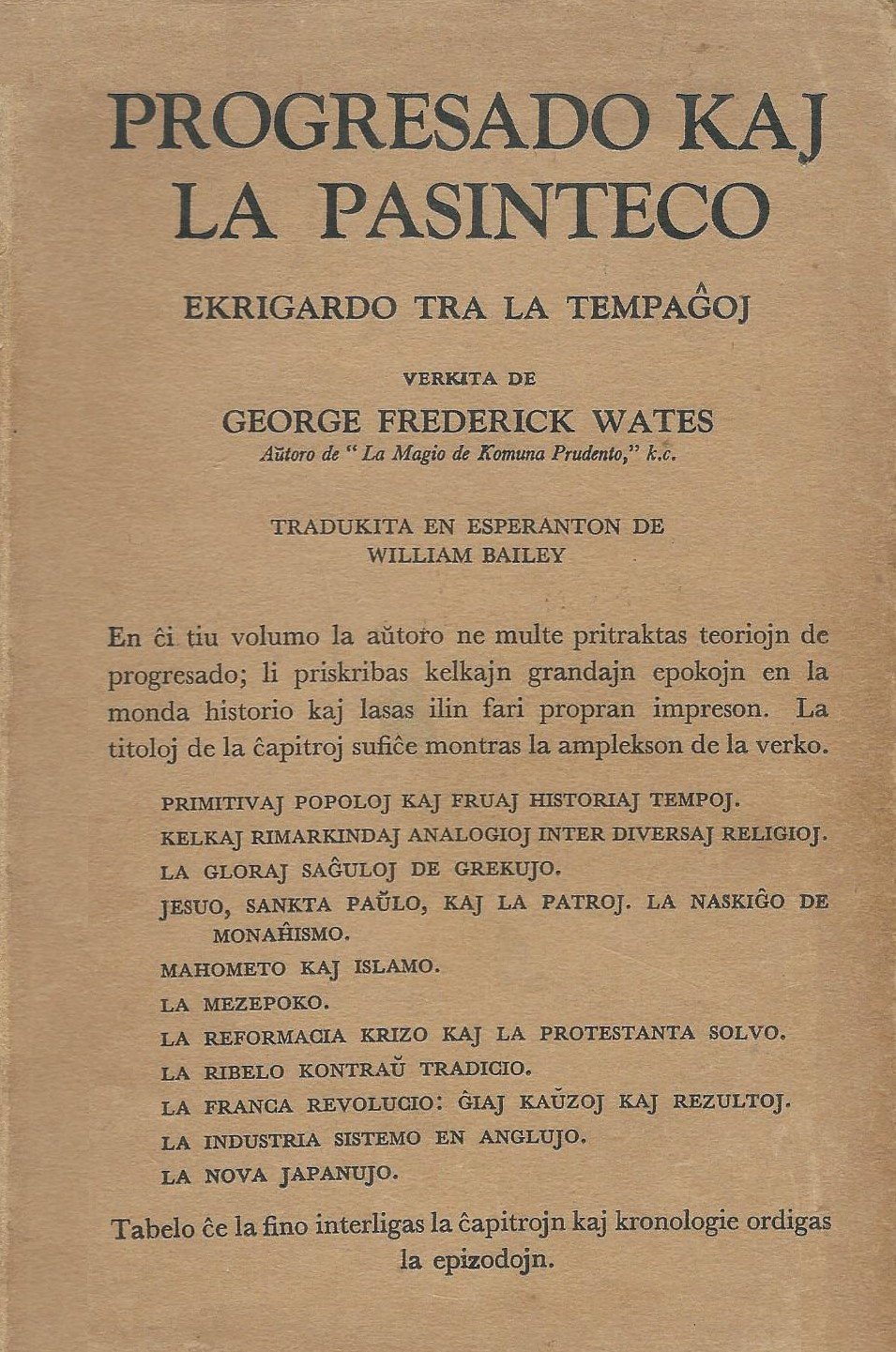 kovrilo de "Progresado kaj Pasinteco"